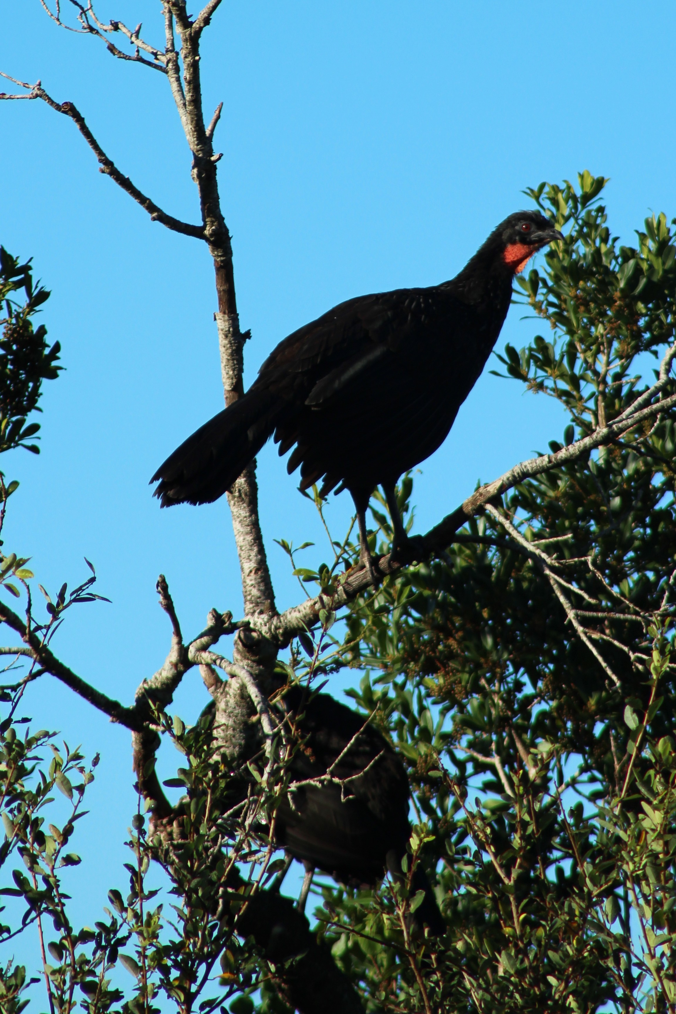 Pava de monte, penelope obscura